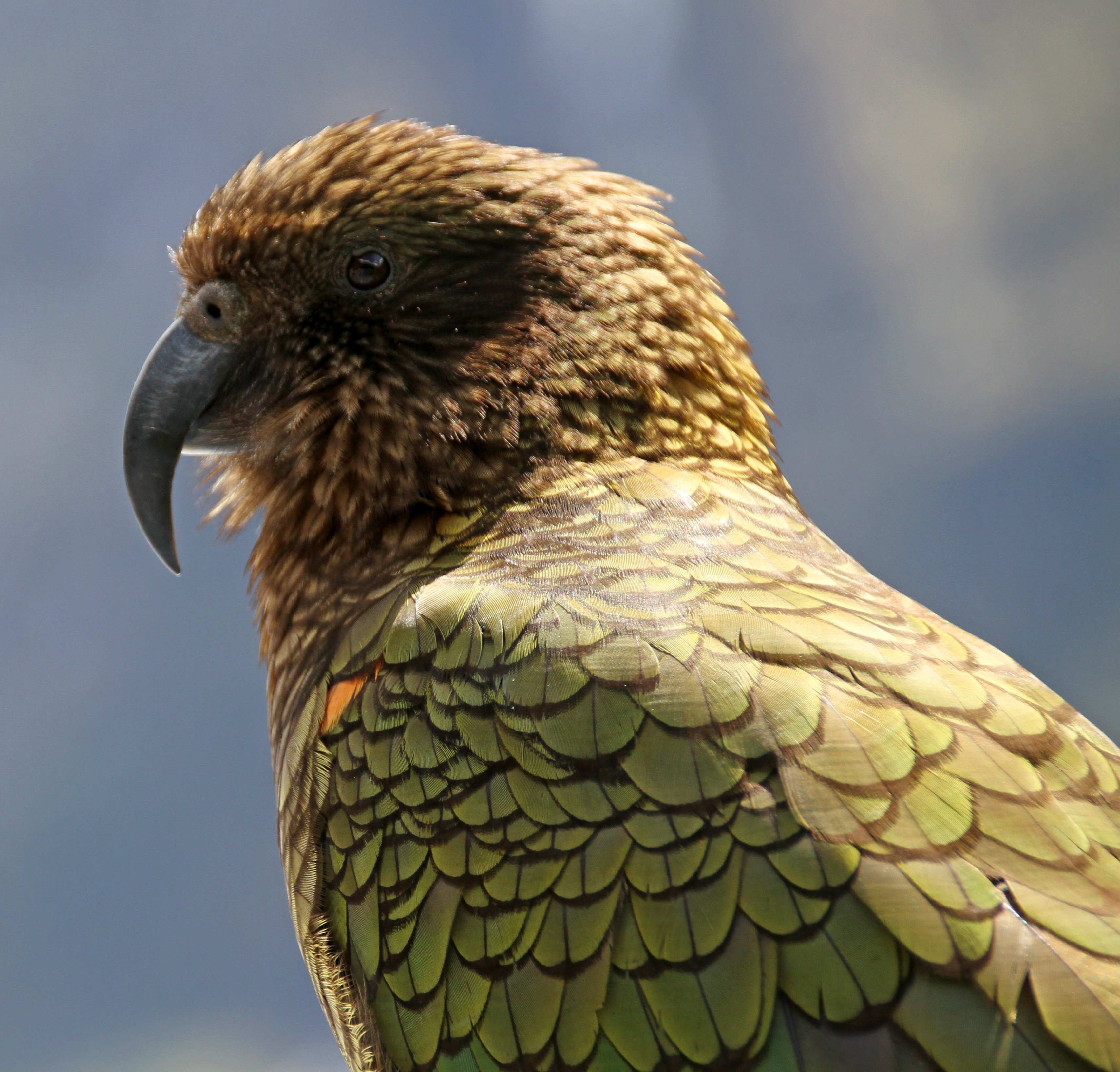 Kea 7